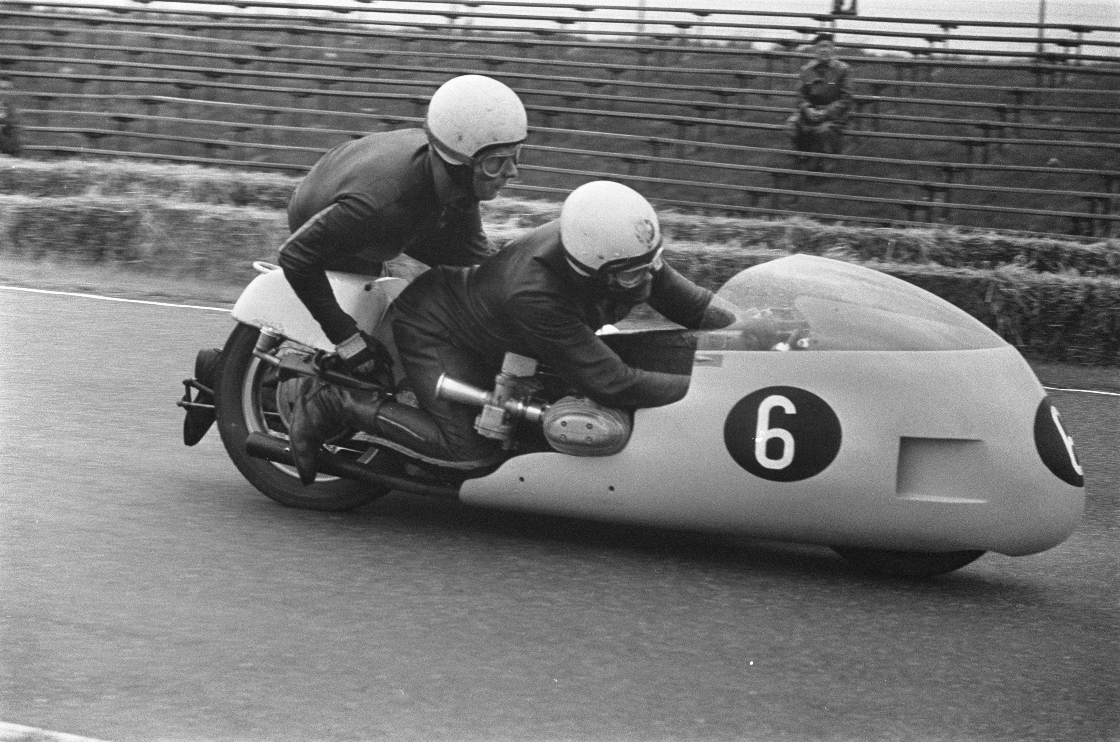 Collectie / Archief : Fotocollectie Anefo Reportage / Serie : TT Assen 1968 Beschrijving : TT te Assen. Training. Zijspan Johann Attenberger en Josef Schillinger Datum : 27 juni 1968 Locatie : Assen Trefwoorden : motoren, motorsport Persoonsnaam : Altenberger, Johan, Schillinger, Josef Instellingsnaam : TT Fotograaf : Nijs, Jac. de / Anefo Auteursrechthebbende : Nationaal Archief Materiaalsoort : Negatief (zwart/wit) Nummer archiefinventaris : bekijk toegang 2.24.01.05 Bestanddeelnummer : 921-4710